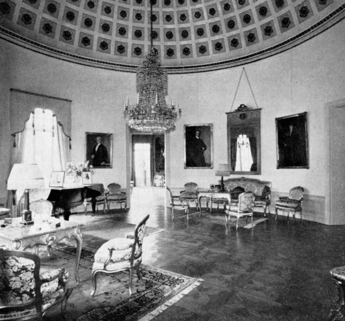 Broby gård, rotundan